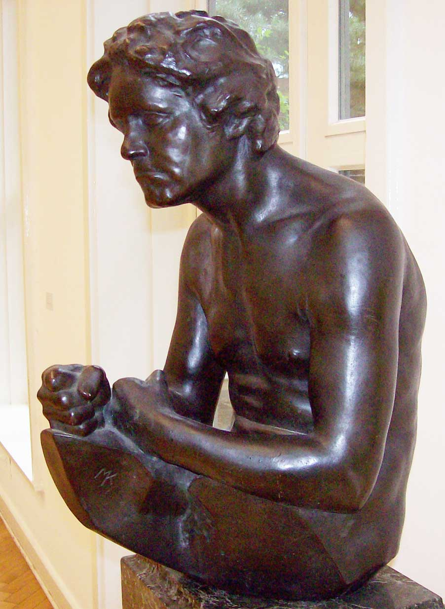 Max Klinger: Beethoven Torso, 1902, Bronze, Meran/Leipzig